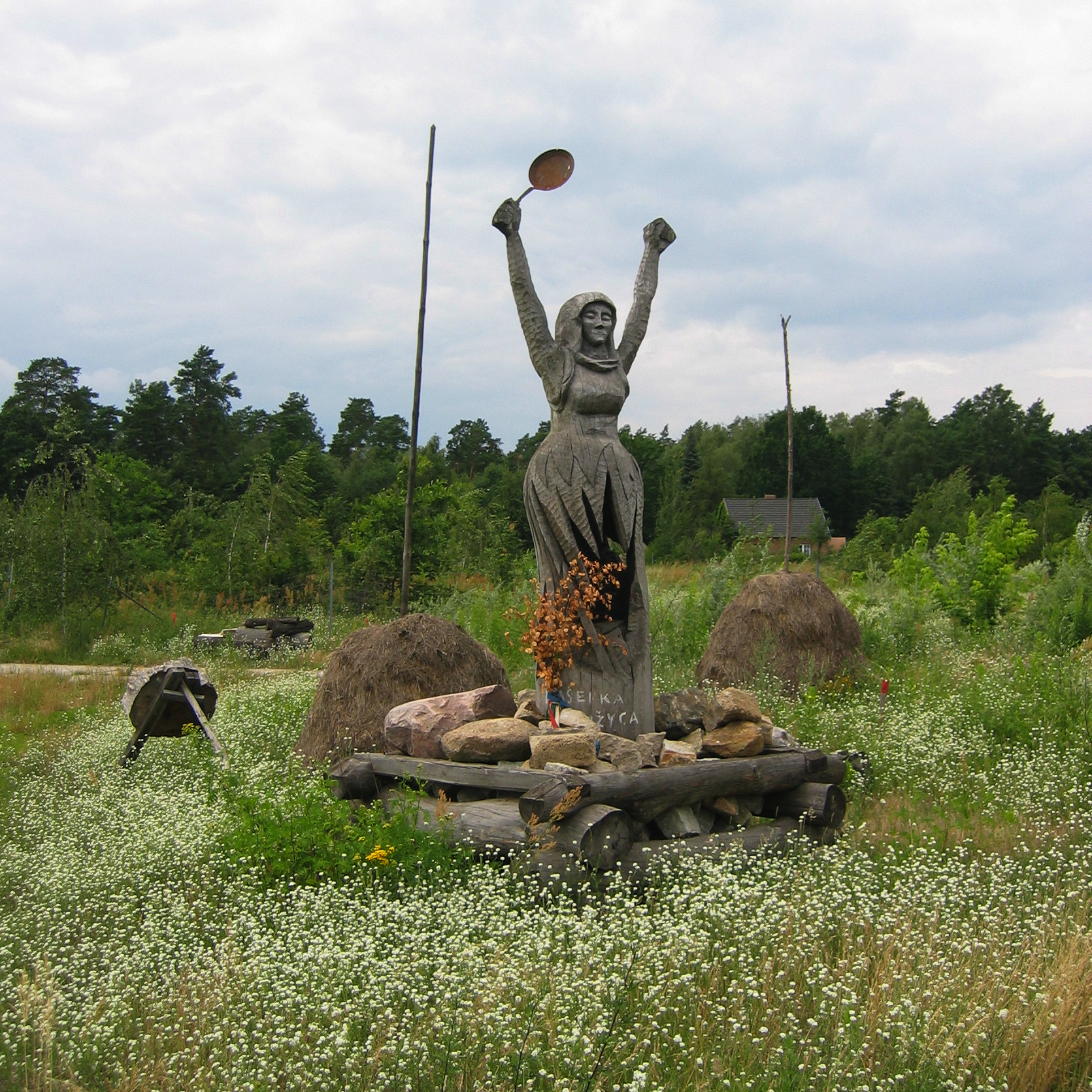 Holzskulptur in Lakoma, Cottbus, Deutschland.